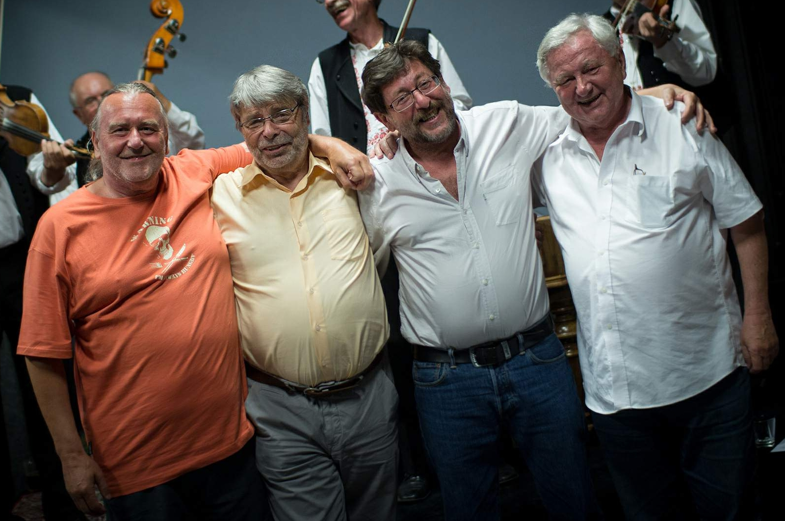 Vedecka rada konference O sexualite a partnerskych vztazich, cerven, 2017, UH, CZ